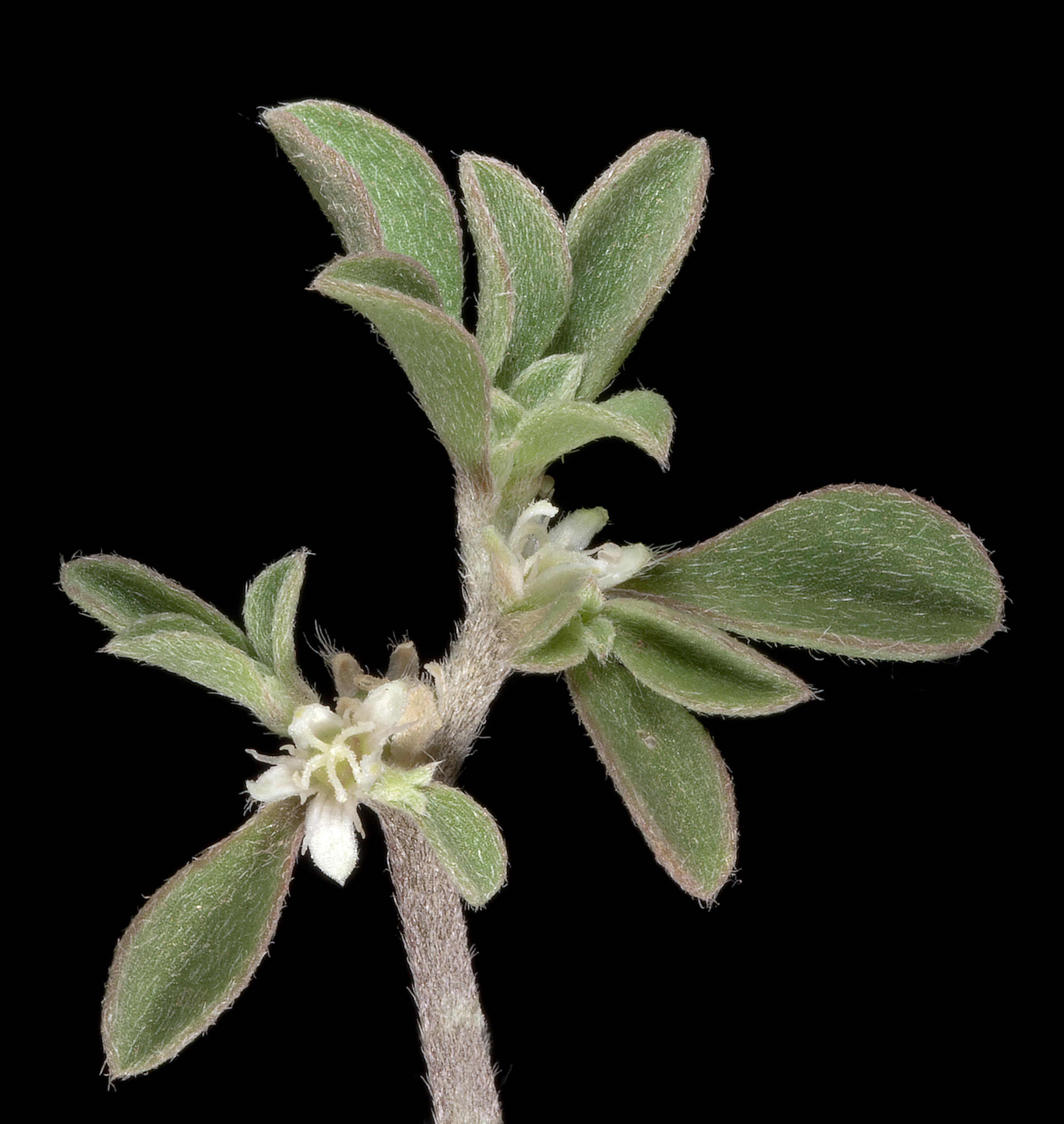 KRT3960